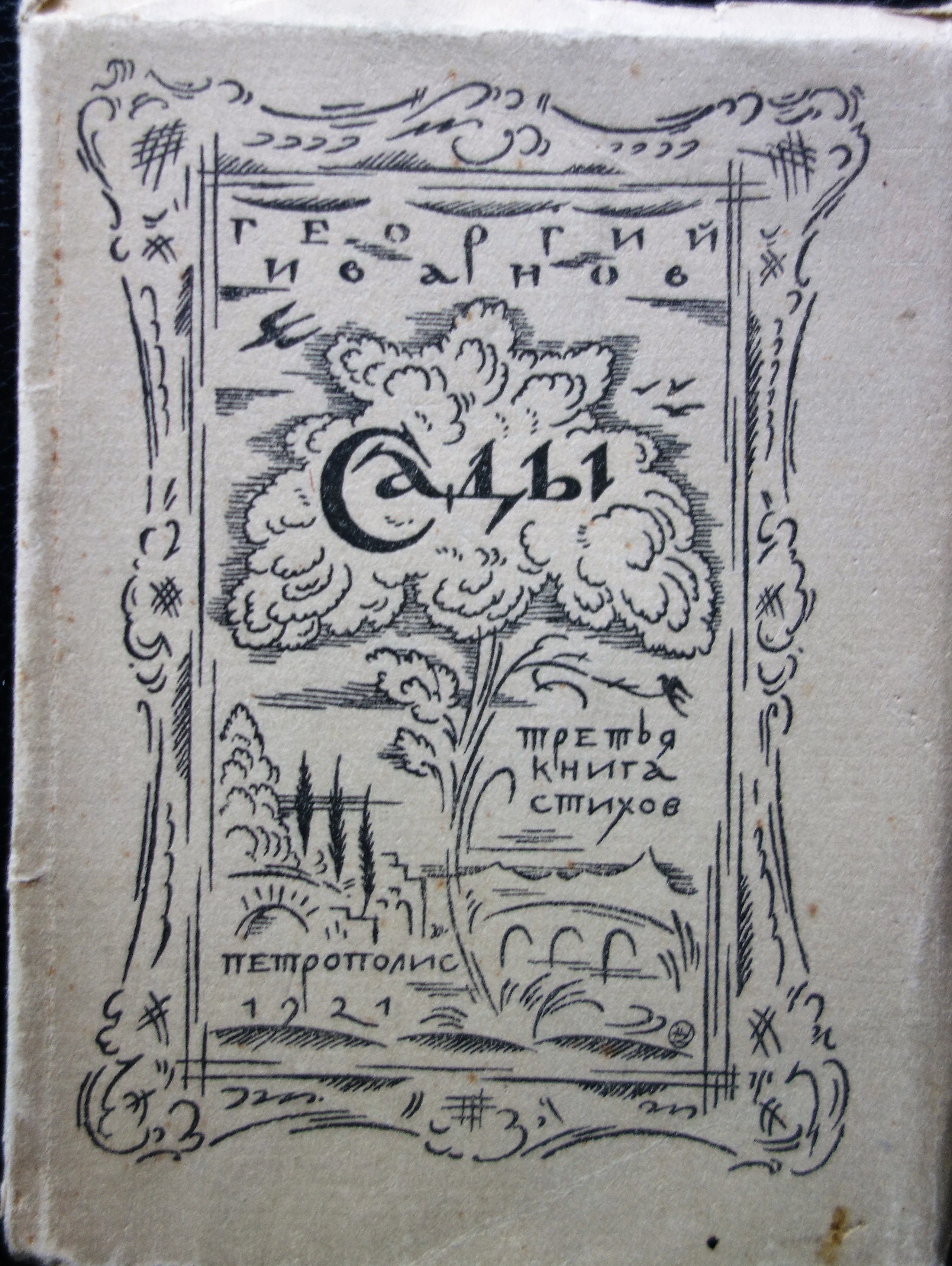 Georgij Iwanow. Sady - Gärten. Petersburg, (Petropolis) 1921 Vorderdeckelillustration von Mstislaw Walerianowitsch Dobuschinski - Мстисла́в Валериа́нович Добужи́нский (1875-1957)